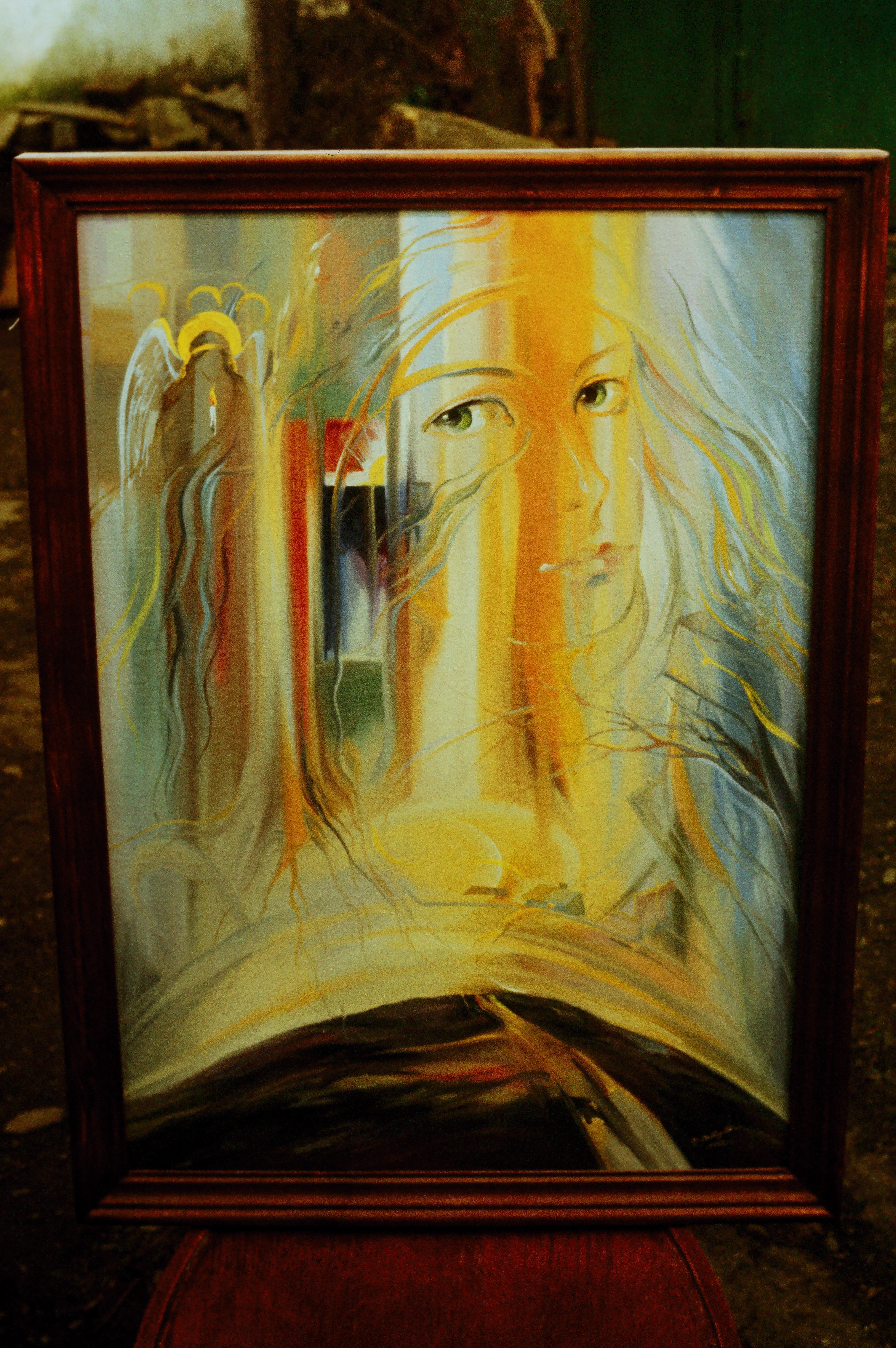 Полотно. Олія. 2007